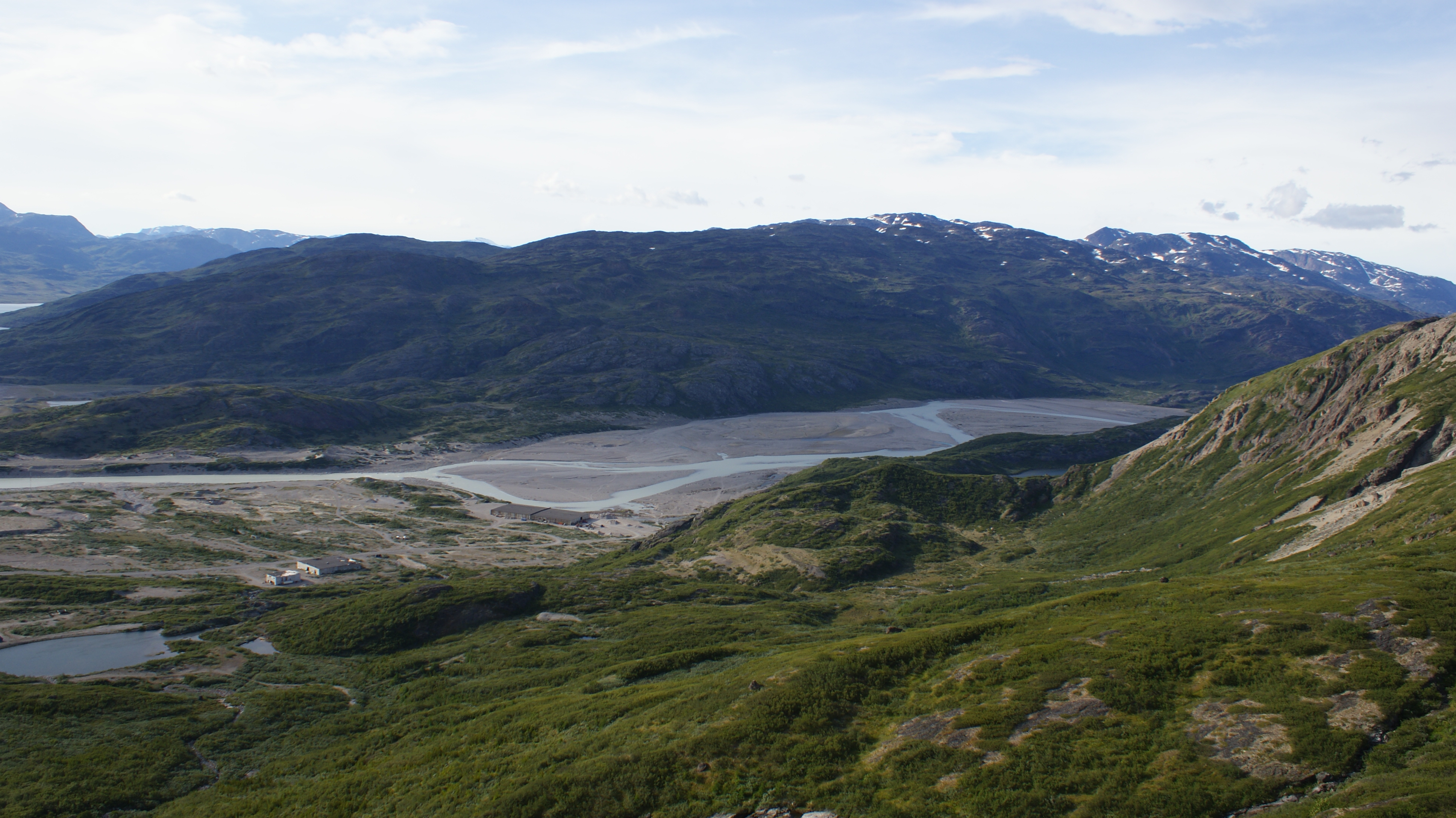 Narsarsuap Kuua (Flower Valley/Blomsterdalen), Narsarsuaq, Greenland, view from Mellemlandet.